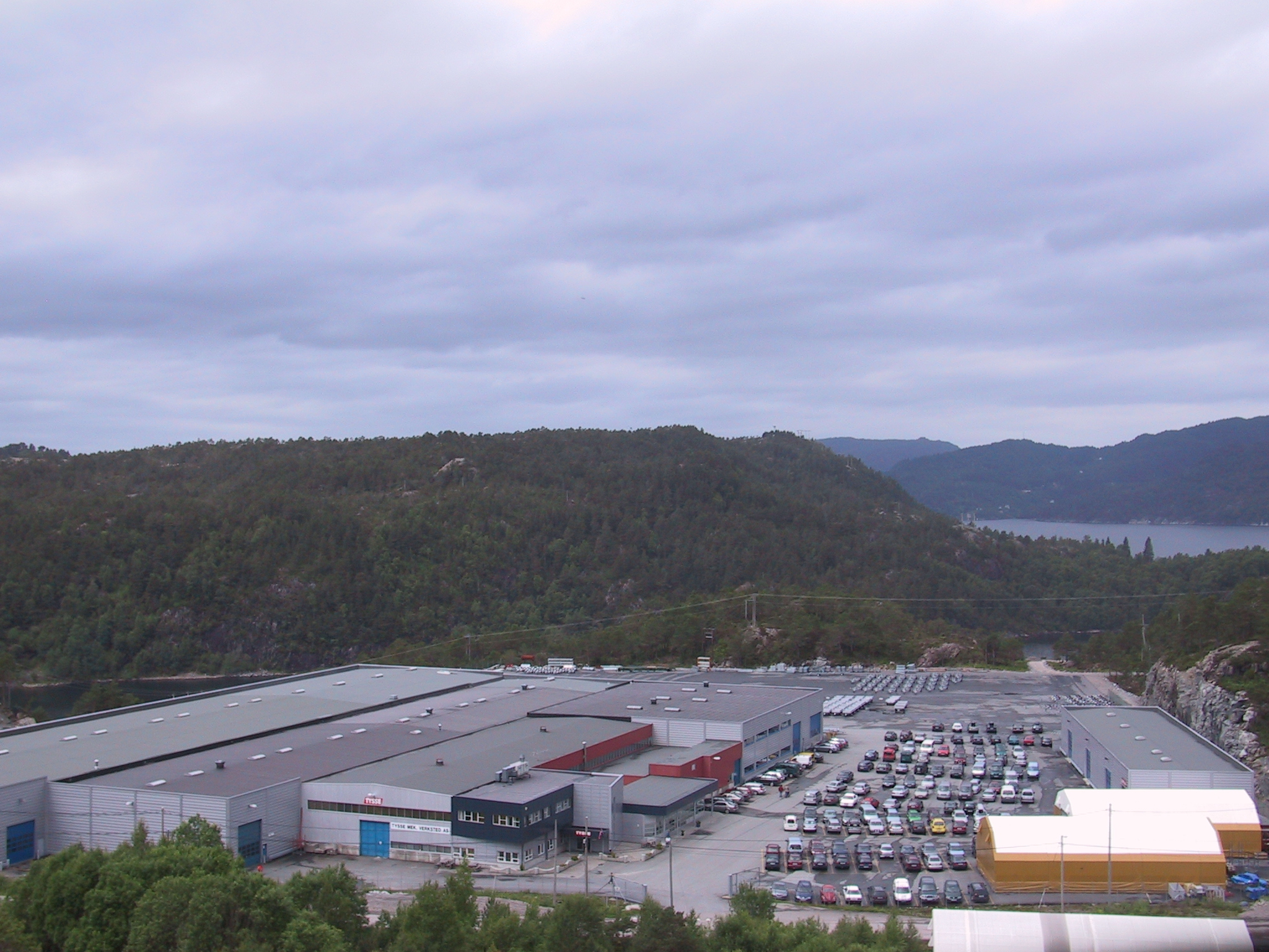 Tysse Mek. verksted AS